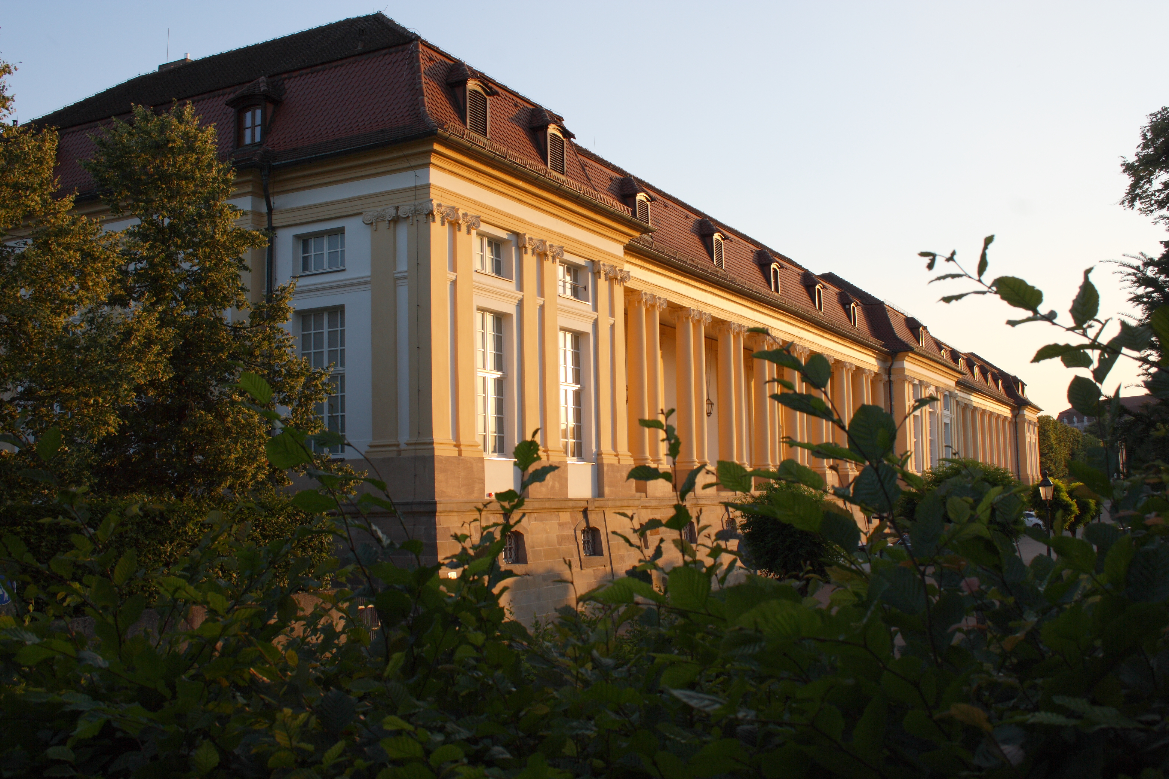 Orangerie in Ansbach